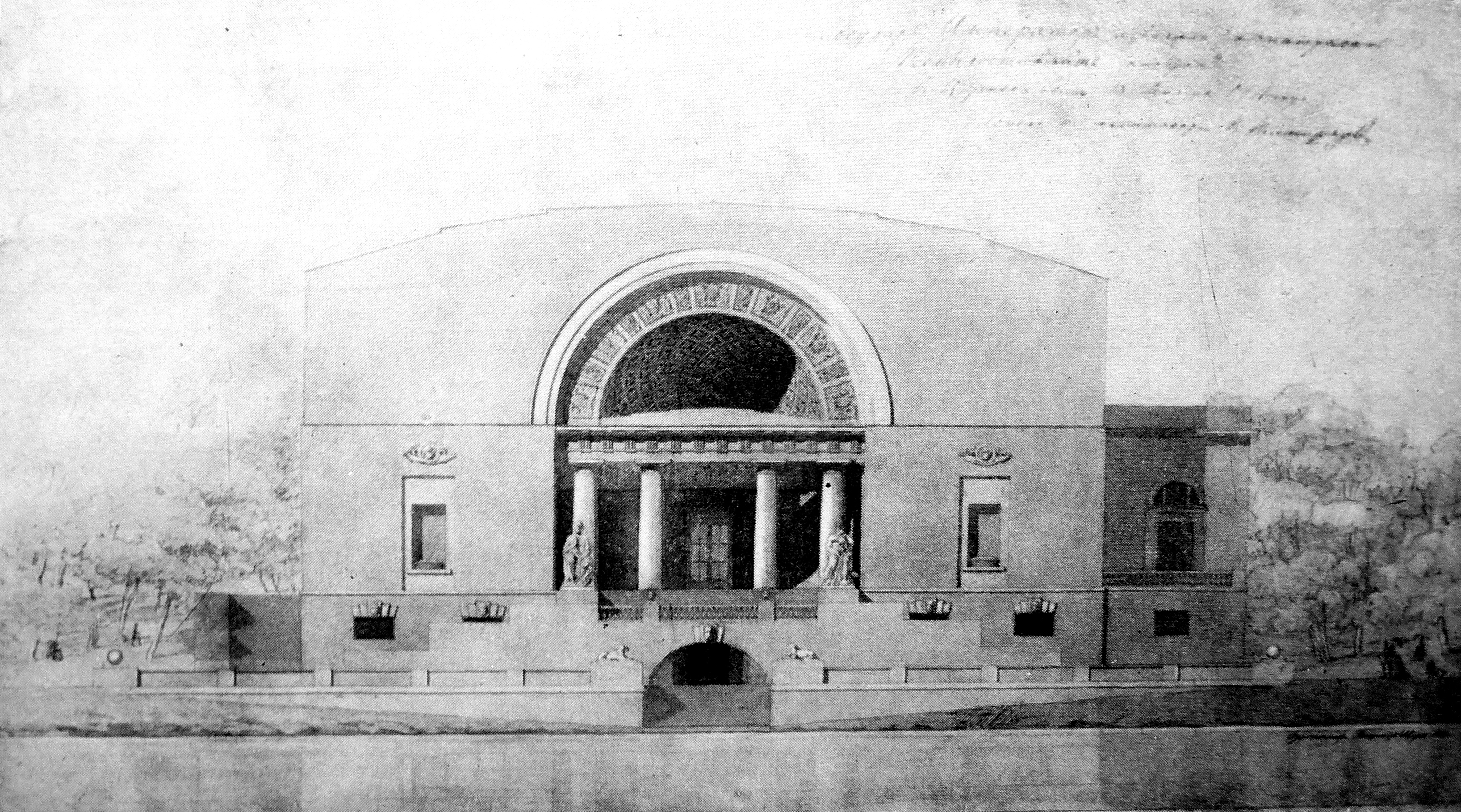 Проект русского павильона на международной выставке в Турине. 1911 г. Архитектор В.А. Щуко.